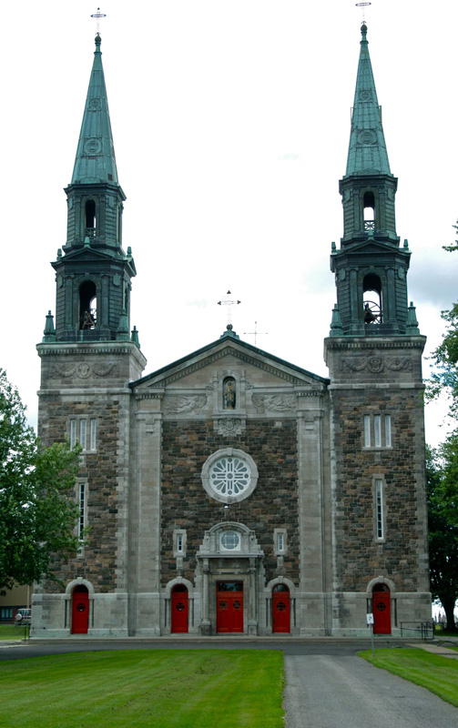 Église St-Denis, St-Denis-sur-Richelieu, Québec, Canada.